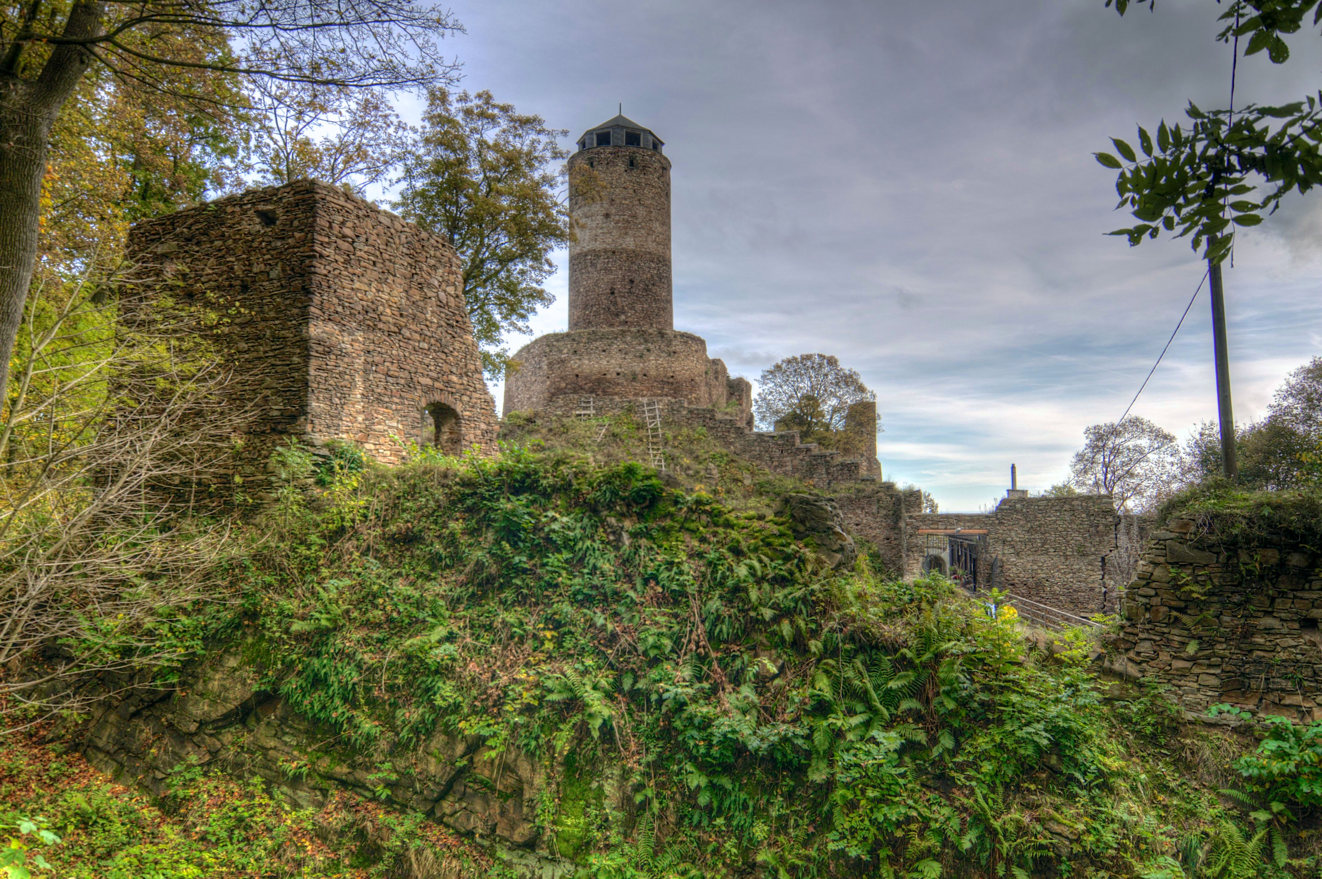 Hrad Hasištejn, parc. 657, 658, 831, Místo.